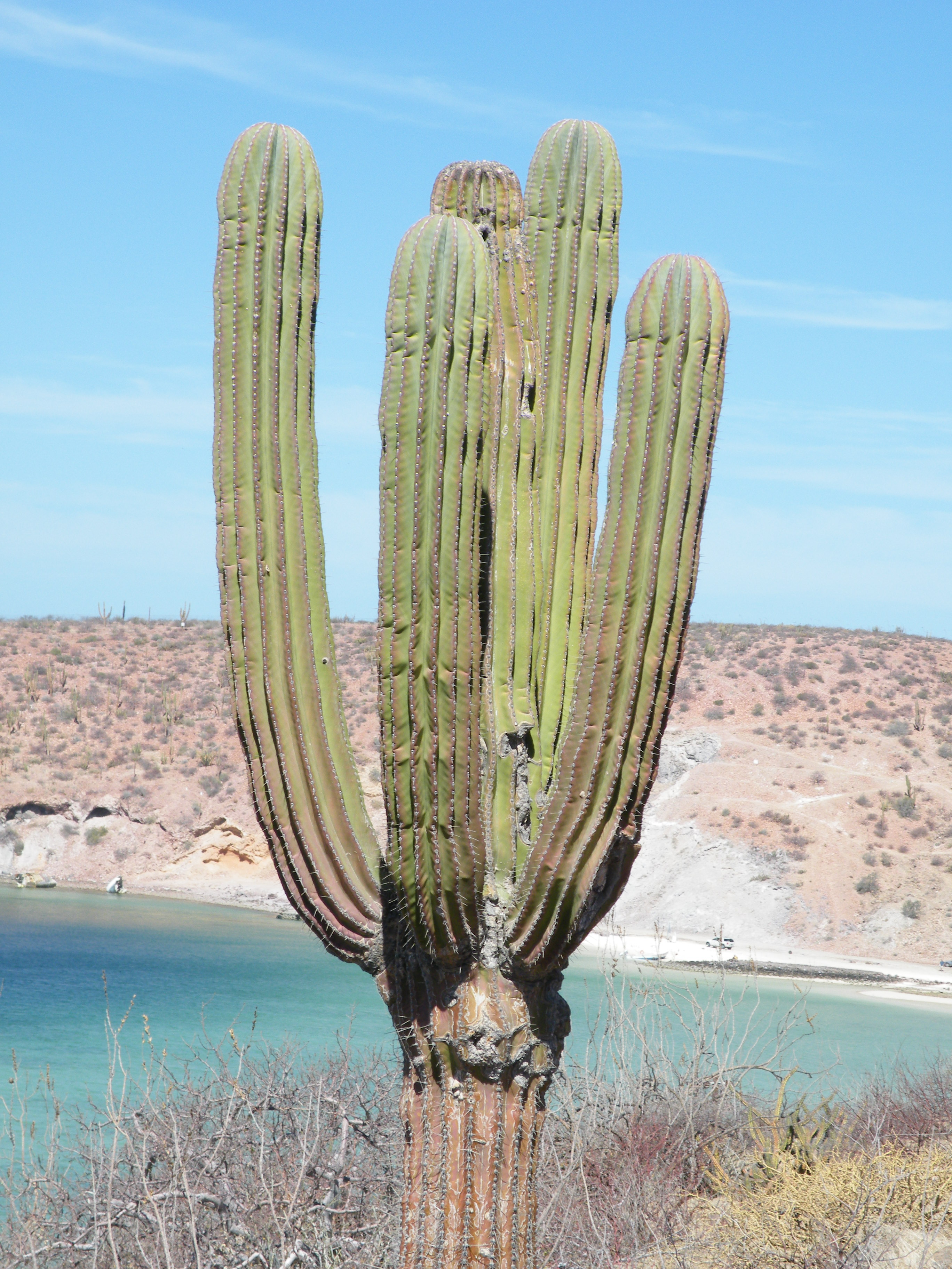 Pichilingue, Baja California Sur